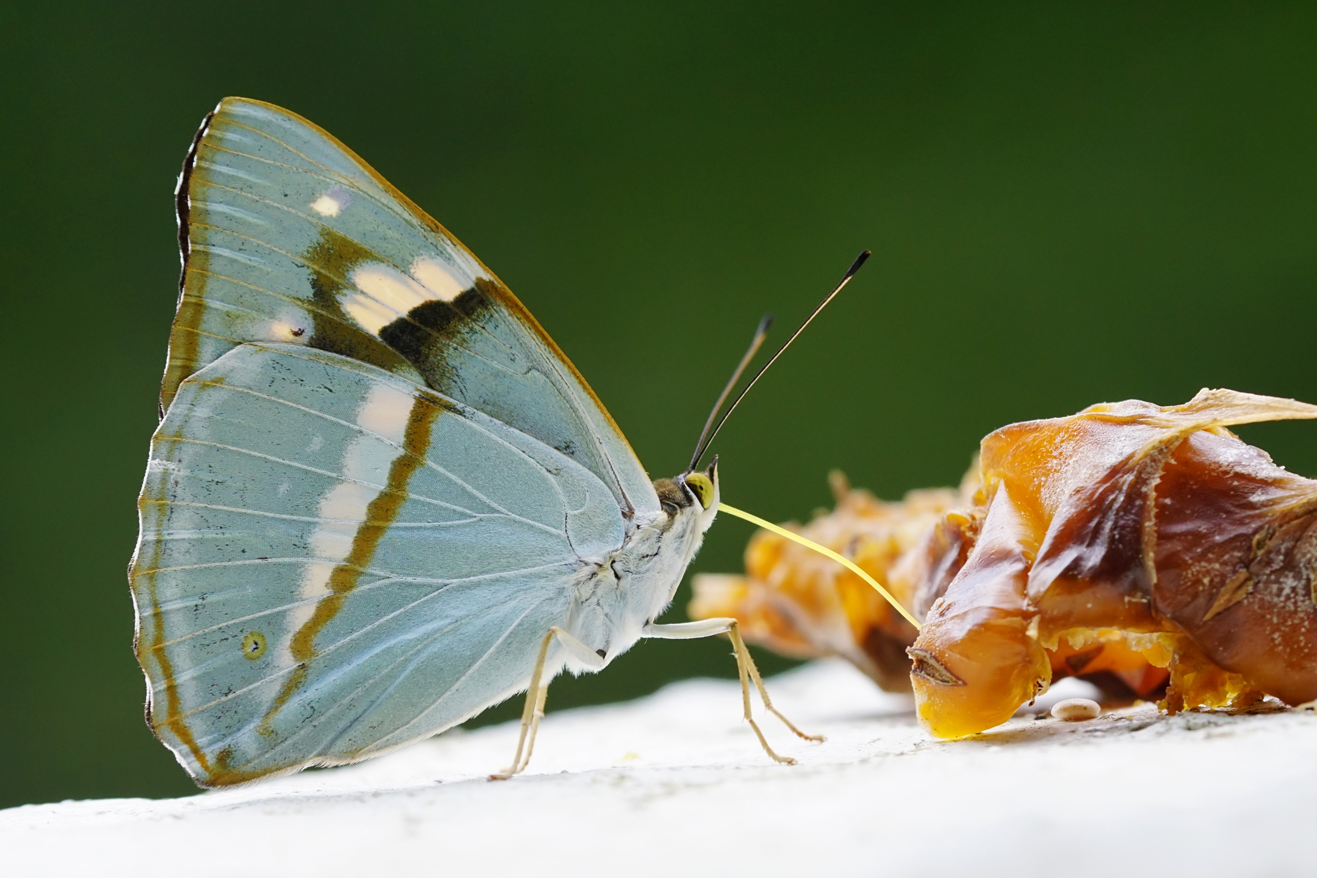 武鎧蛺蝶 Chitoria ulupi arakii 雌